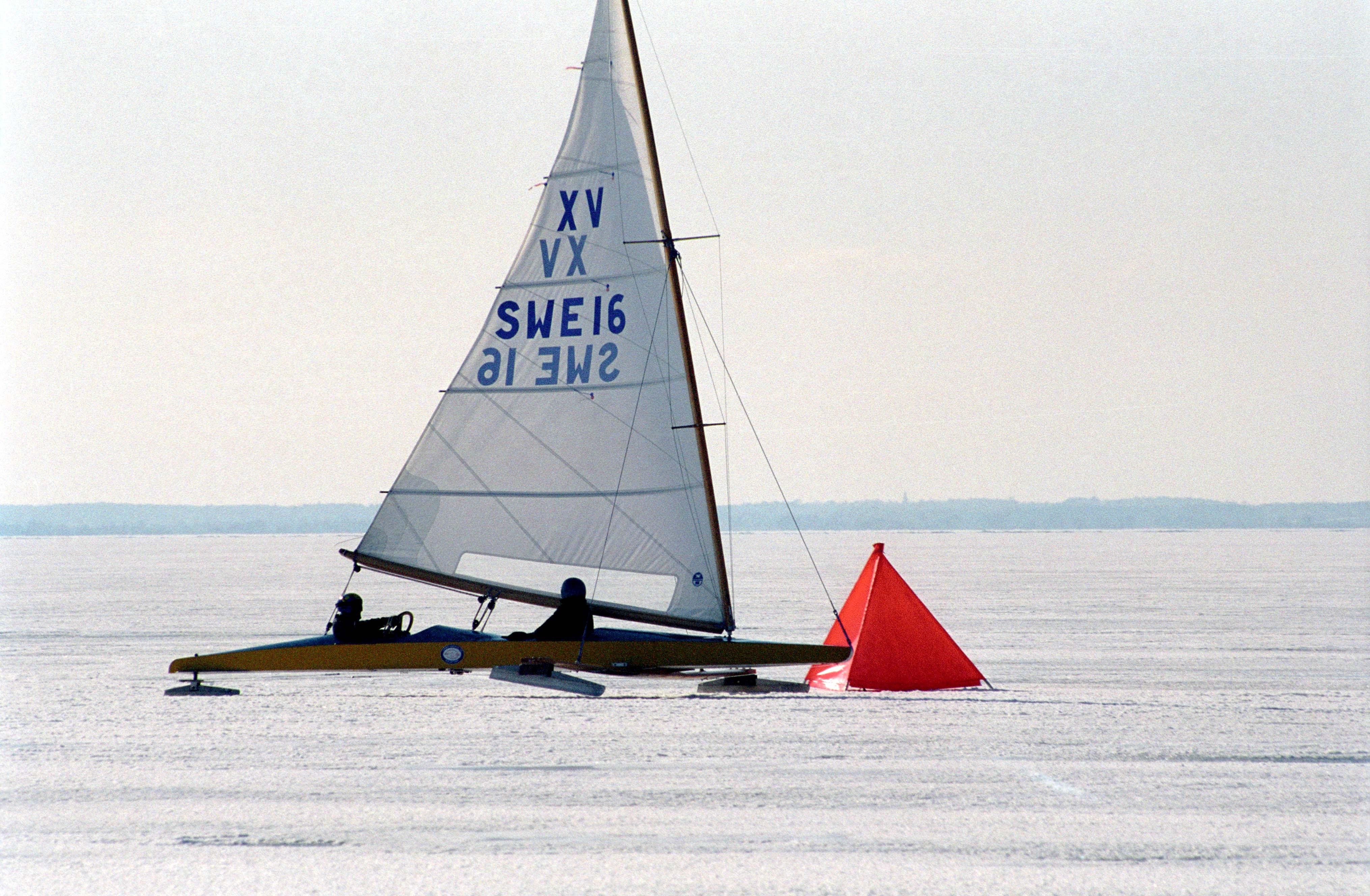 XV-jakt på kappseglingsbanan. Foto 2004.